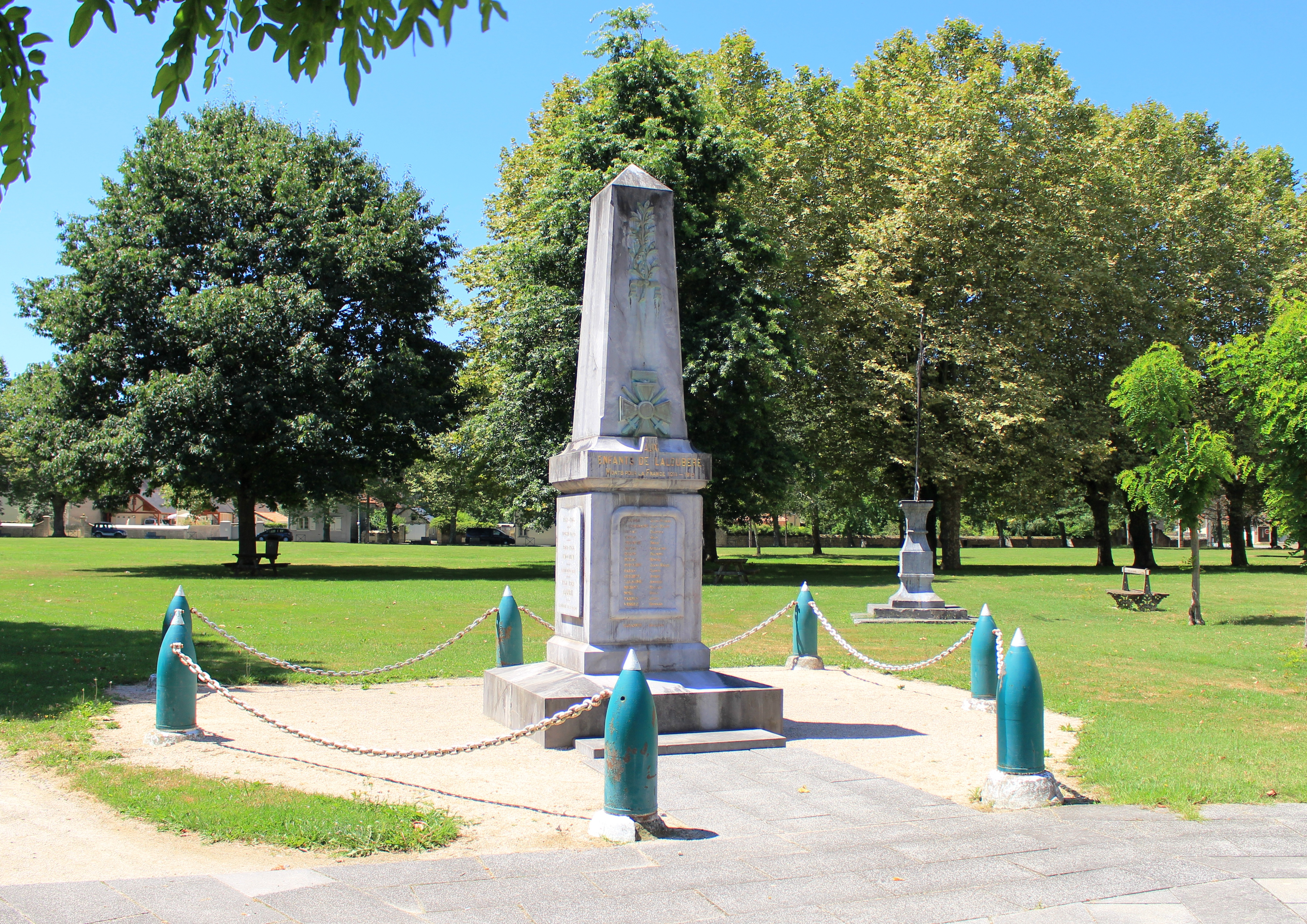 Monument aux morts de Laloubère (Hautes-Pyrénées)